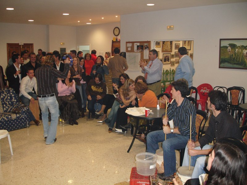 Zambomba Jerezana, Peña El Cañizo, (Andalucía, Spain)